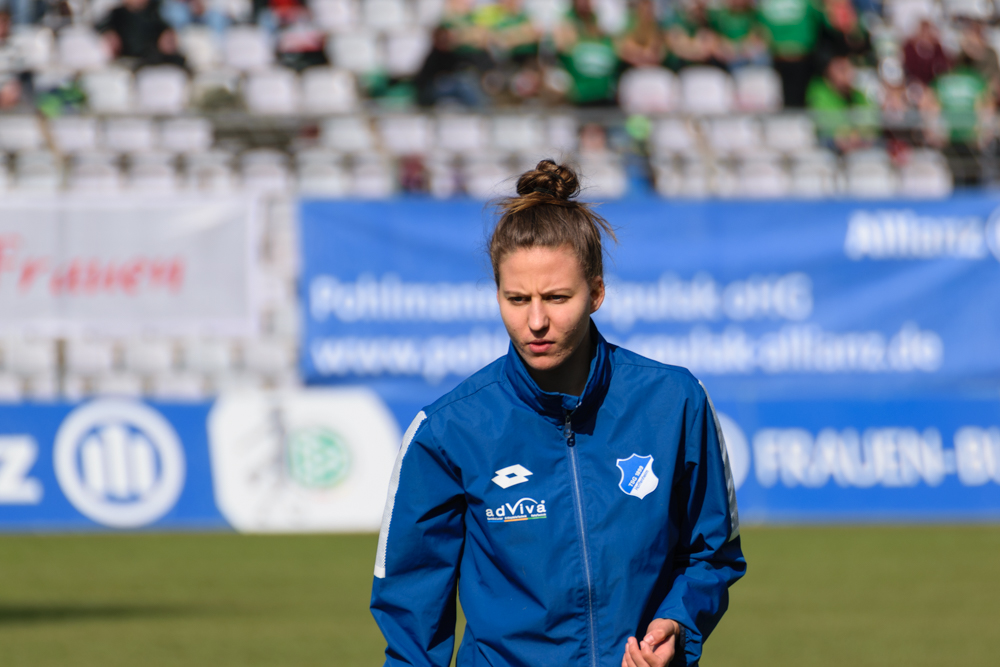 Franziska Harsch warming up during halftime at FC Bayern vs TSG Hoffenheim